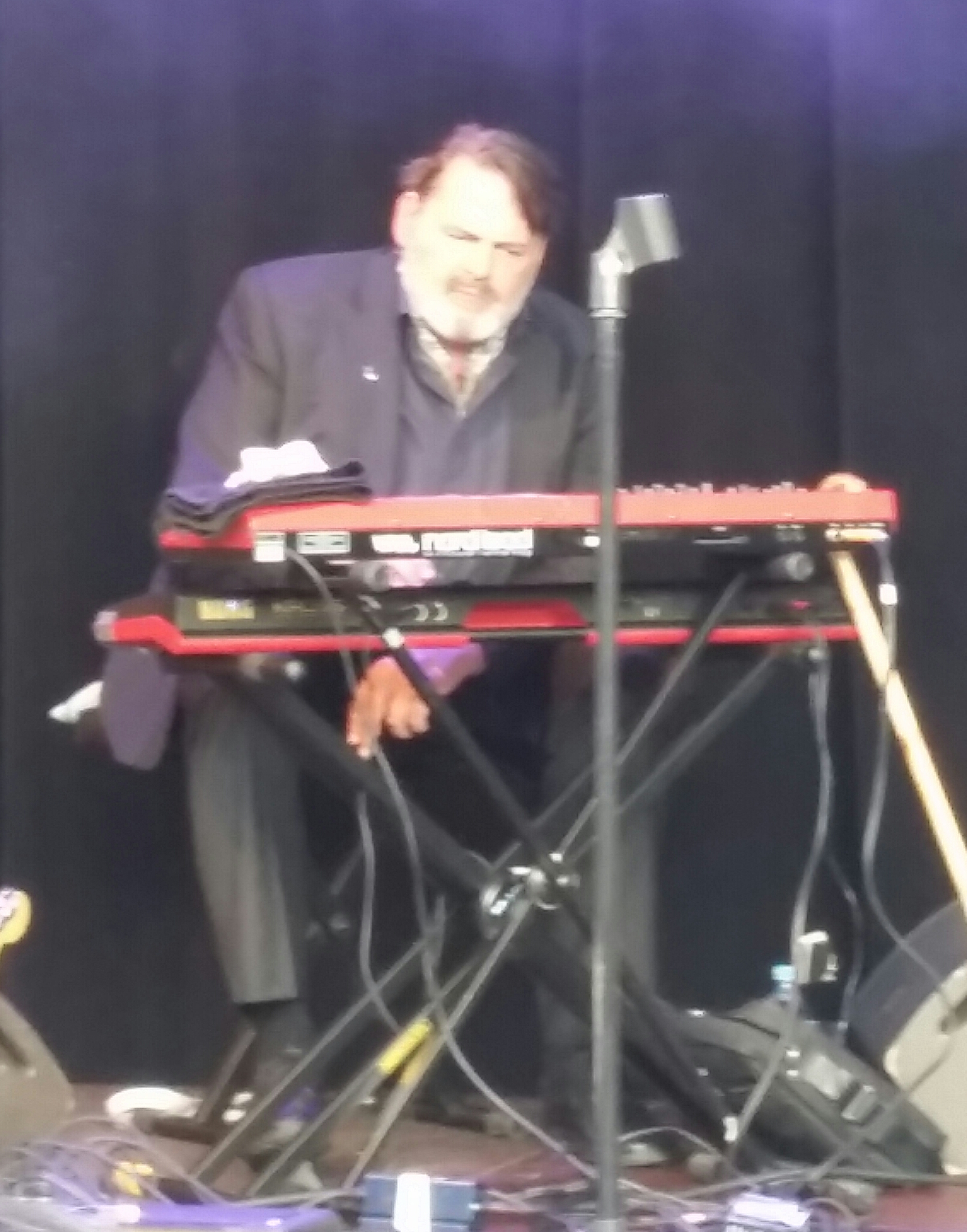 Musikern Tom Wolgers, fotograferad vid en konsert med Lustans Lakejer 13 juli 2017